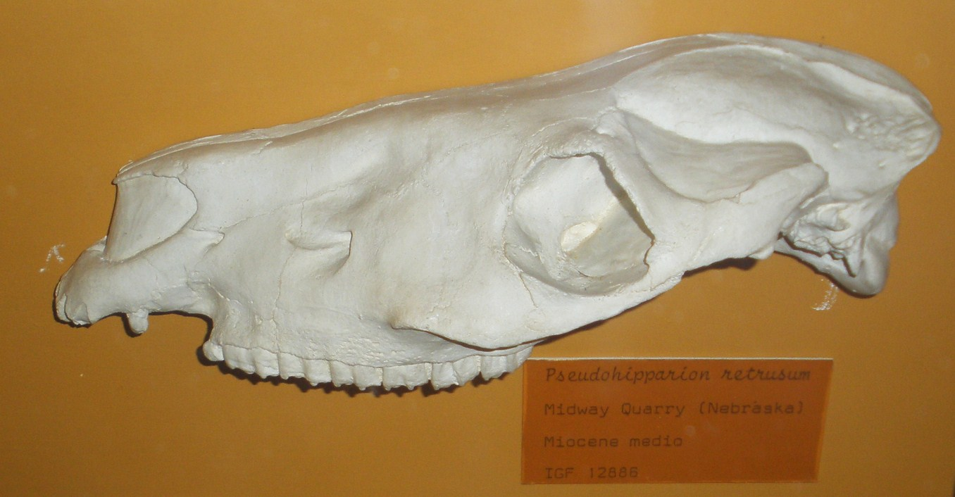 Fossil of Pseudhipparion retrusum, an extinct mammal -- Took the picture at Museo di Paleontologia di Firenze